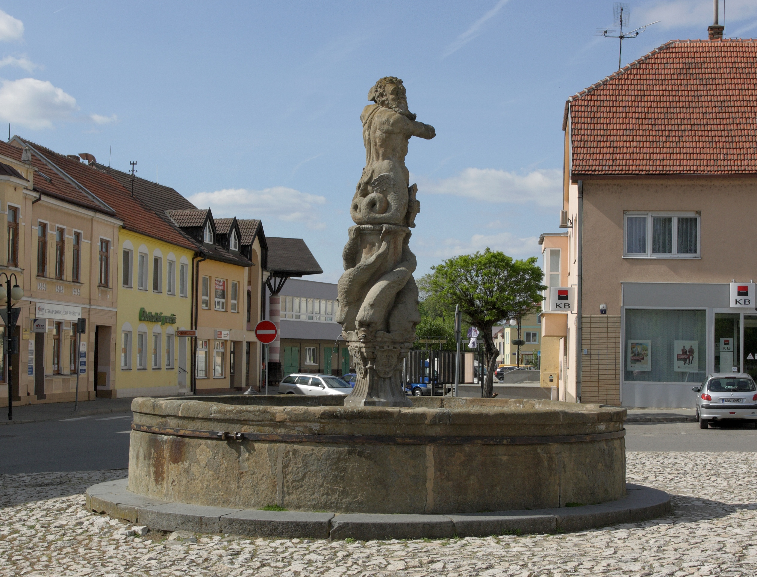 Hustopeče, Dukelské náměstí - renesanční kašna s Tritonem a delfíny.